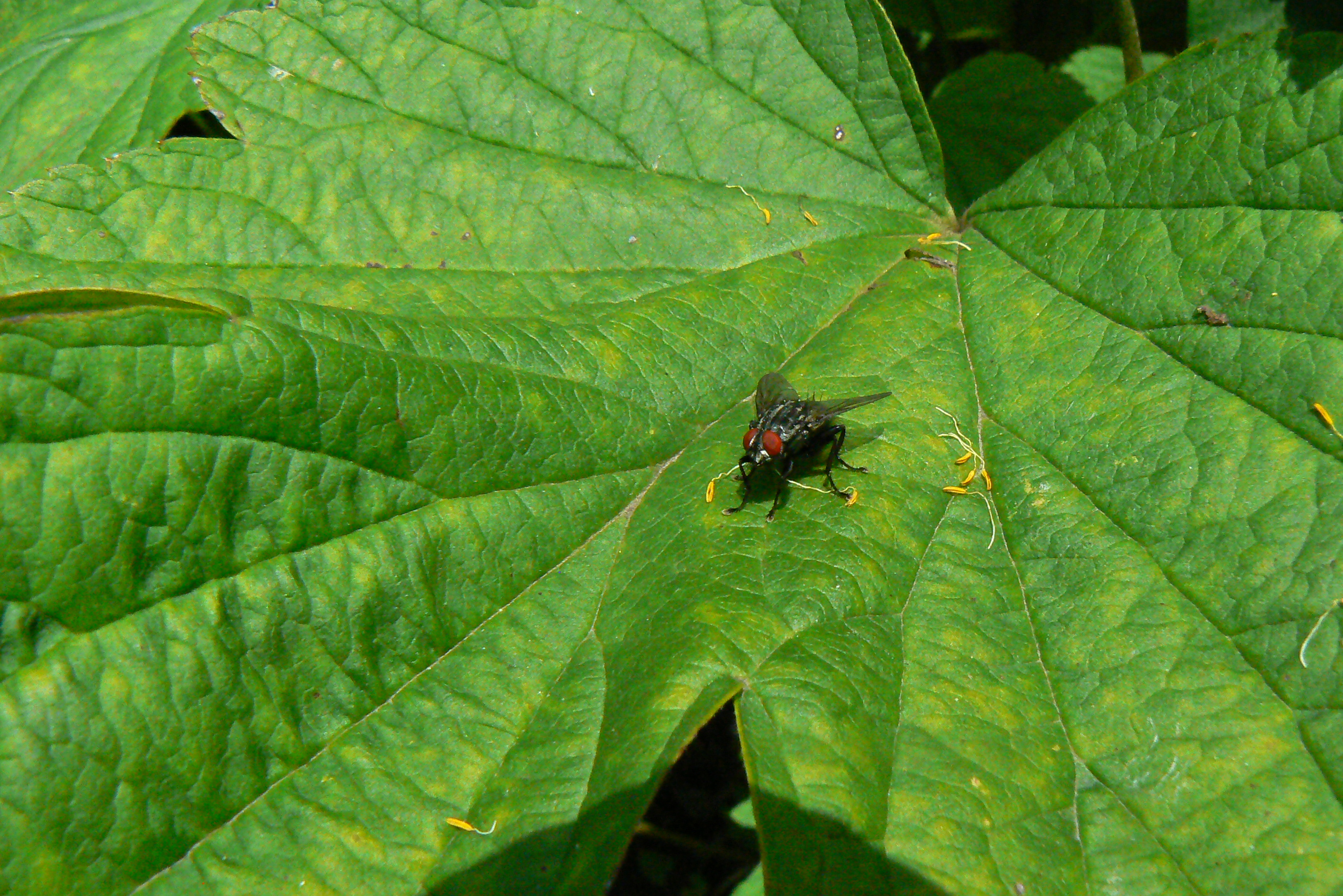 moucha domácí